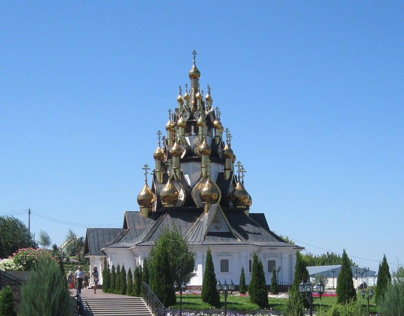 Церковь Спаса Преображения на территории Усть-Медведицкого Спасо-Преображенского монастыря